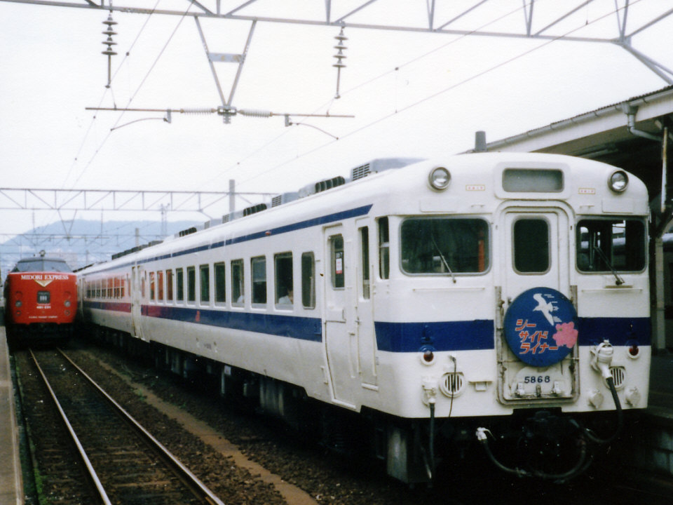 キハ58系快速「シーサイドライナー」（JR九州標準色） 佐世保駅にて